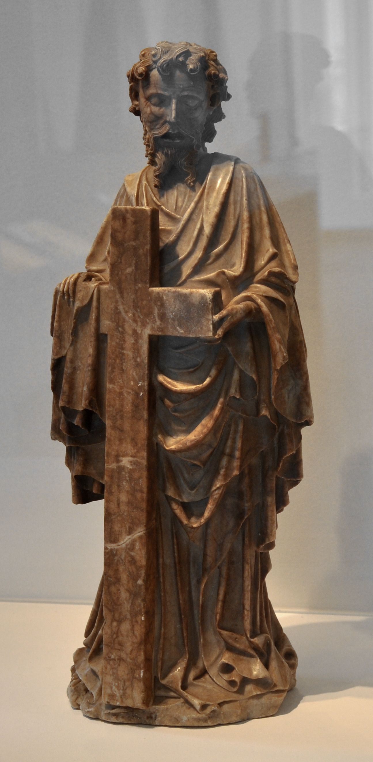 Heiliger Petrus, rheinischer Meister in Rimini, um 1420; Alabaster; Museum für Angewandte Kunst Frankfurt am Main, Inv. Nr. Mu. St. 15 (erworben mit der Oskar-und-Inge-Mulert-Stiftung)